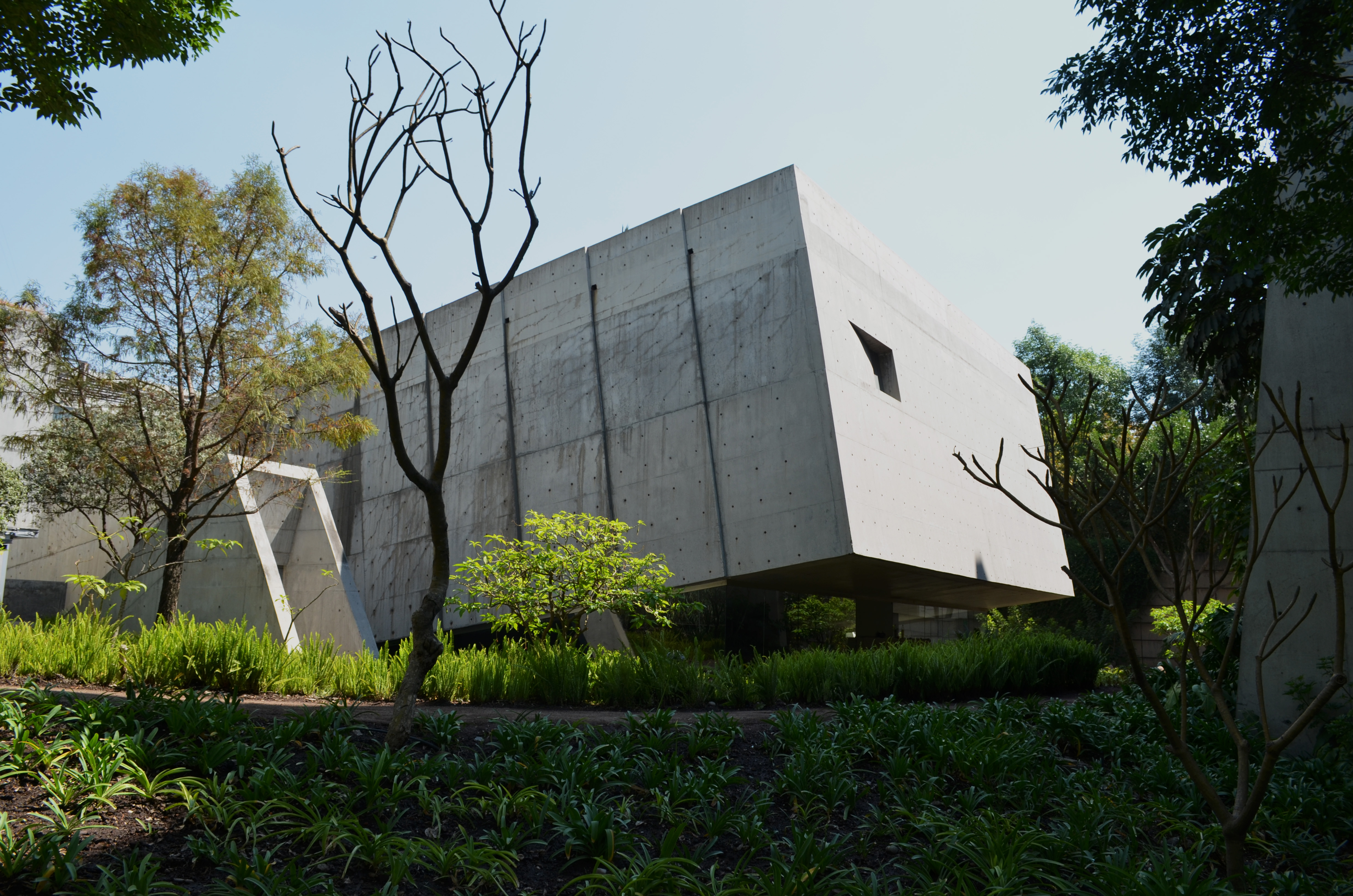 Vista dede los jardines.